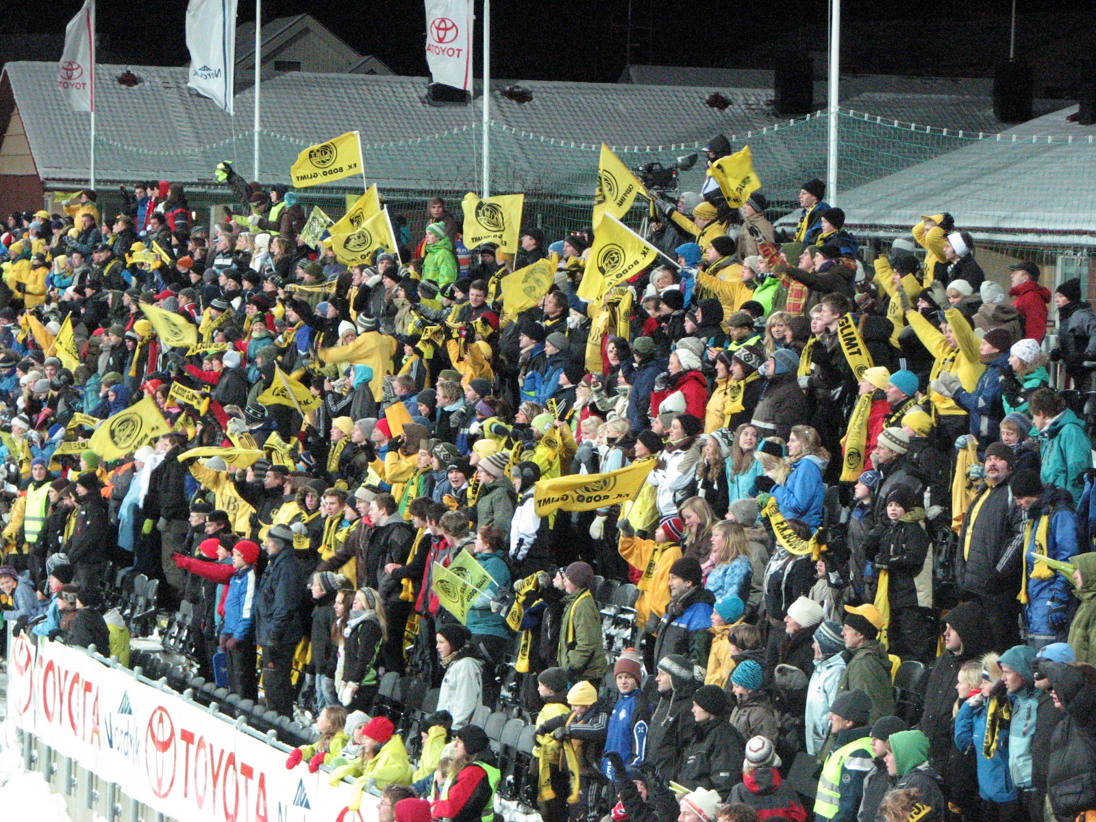 Tippeligakvalifiseringen mellom Bodø/Glimt og Odd Grenland. Publikum